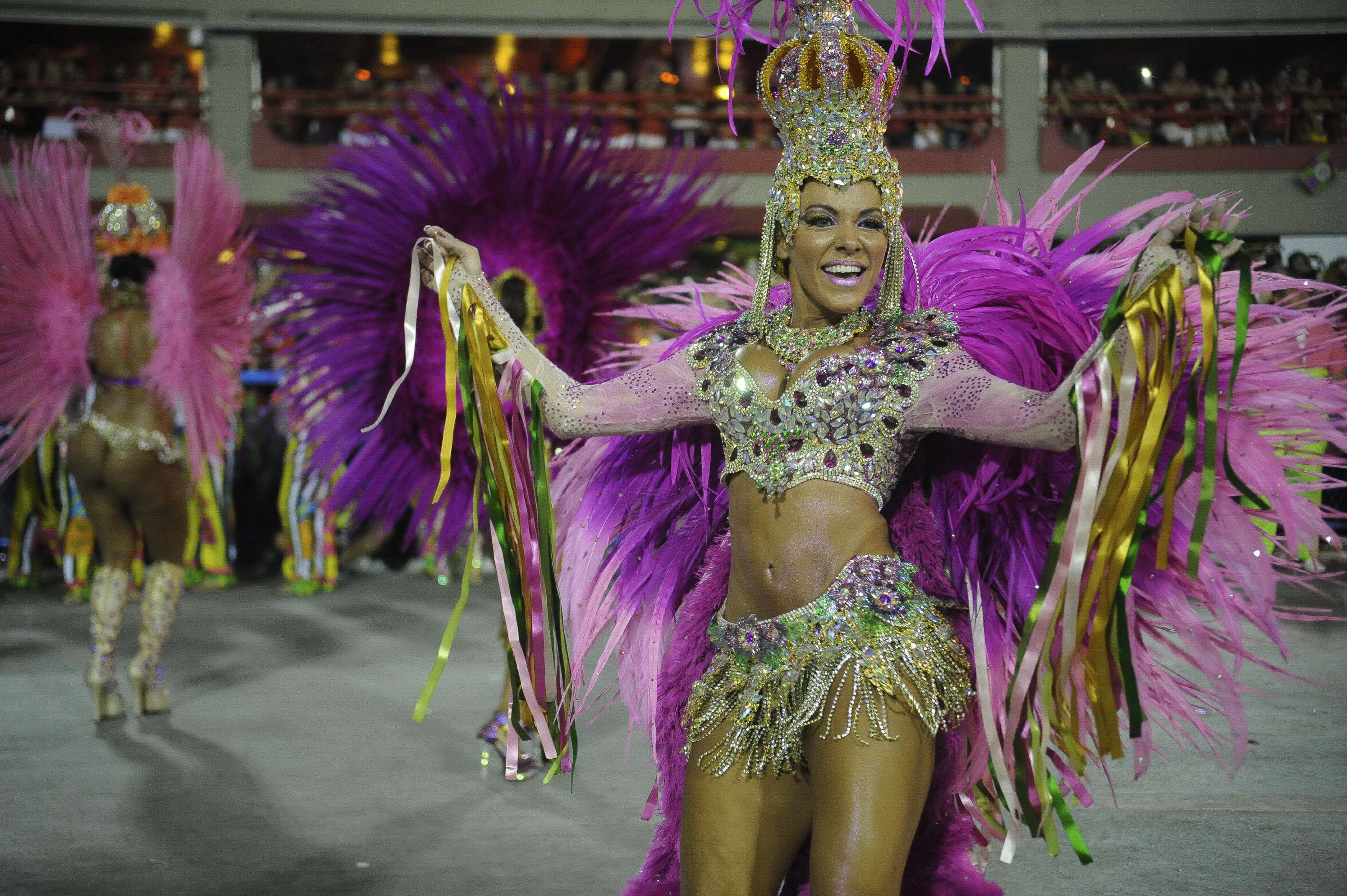 Rio de Janeiro - Escolas de samba do Grupo Especial se apresentam no Sambódromo da Marquês de Sapucaí, no primeiro dia de desfiles (Fernando Frazão/Agência Brasil)